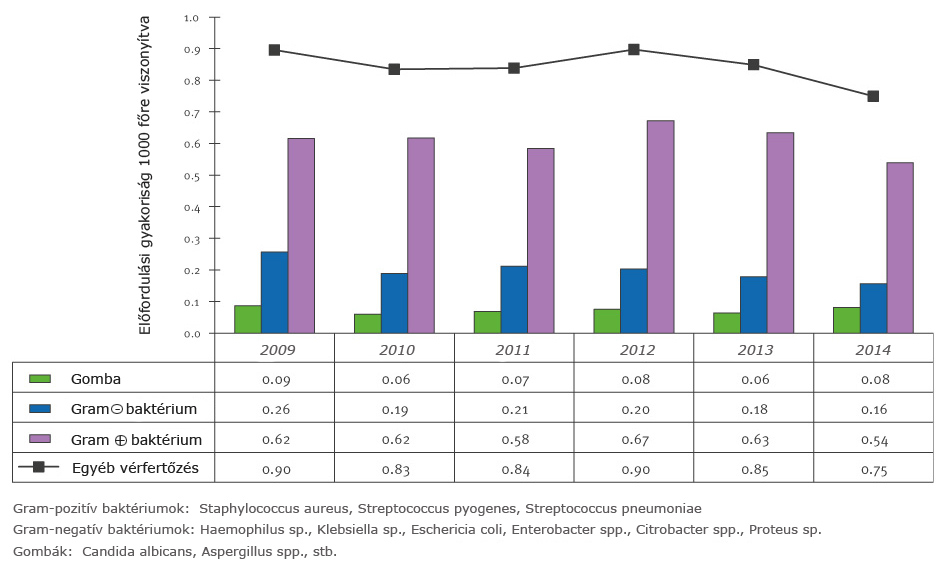 Statisztikai kim.